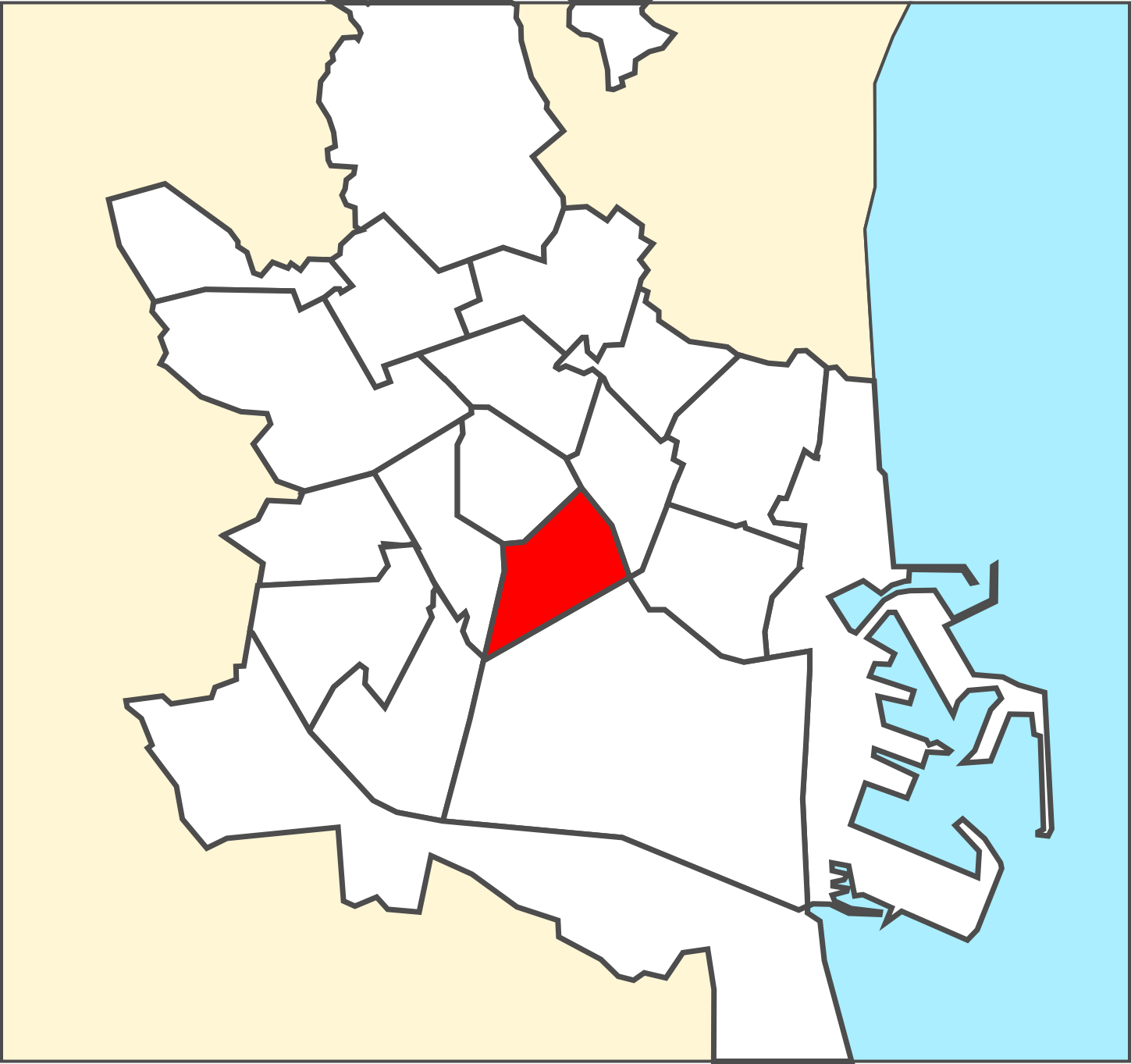 Districte de Eixample.